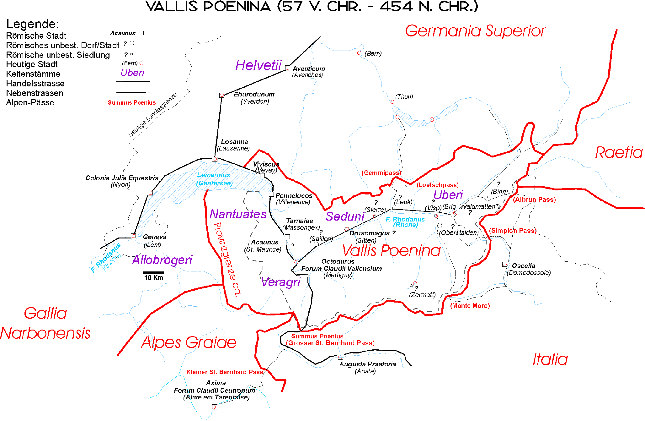 Karte des Wallis in Römischer Zeit (Wallisergeschichte)